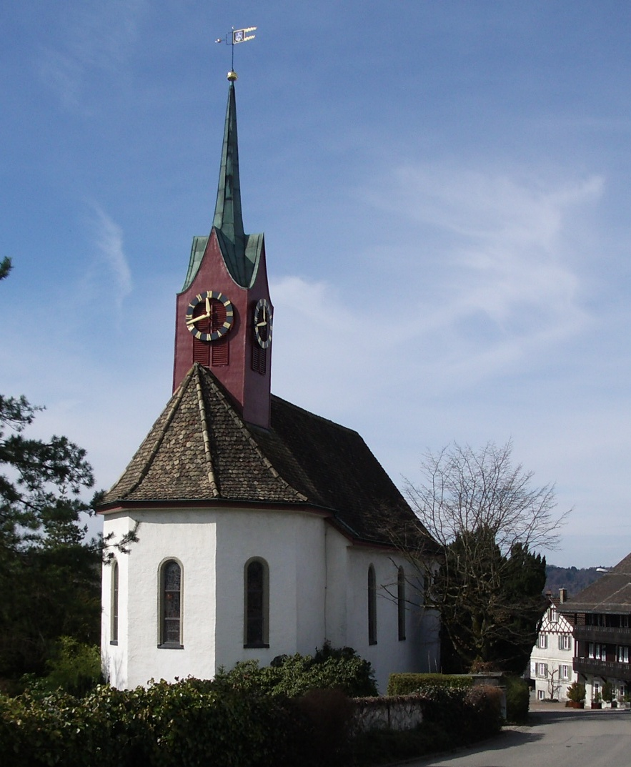 Uitikon ZH, Switzerland self-made, April 2006